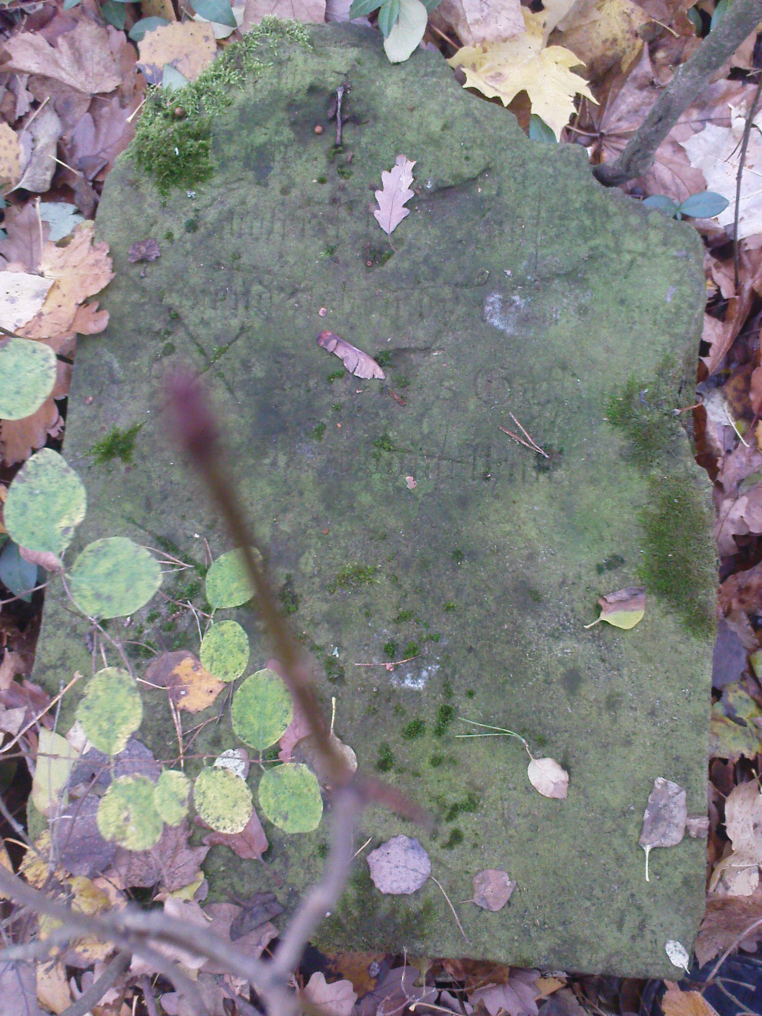 Tabliczka na byłym cmentarzu ewangelickim w Dąbrowie.